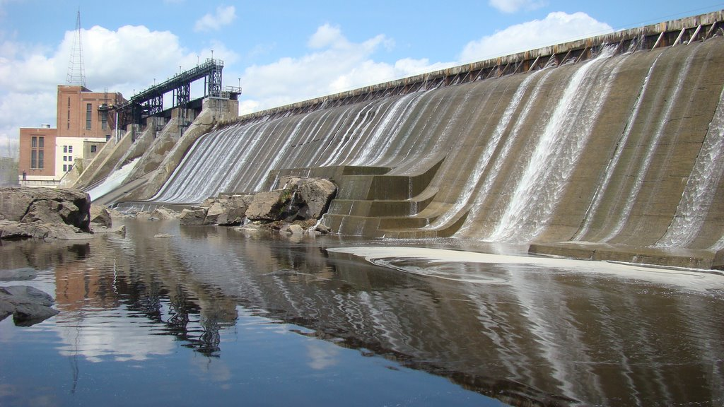 Centrale Hydroélectrique de Drummondville 2 Situé au Centre du Québec au Québec , Canada